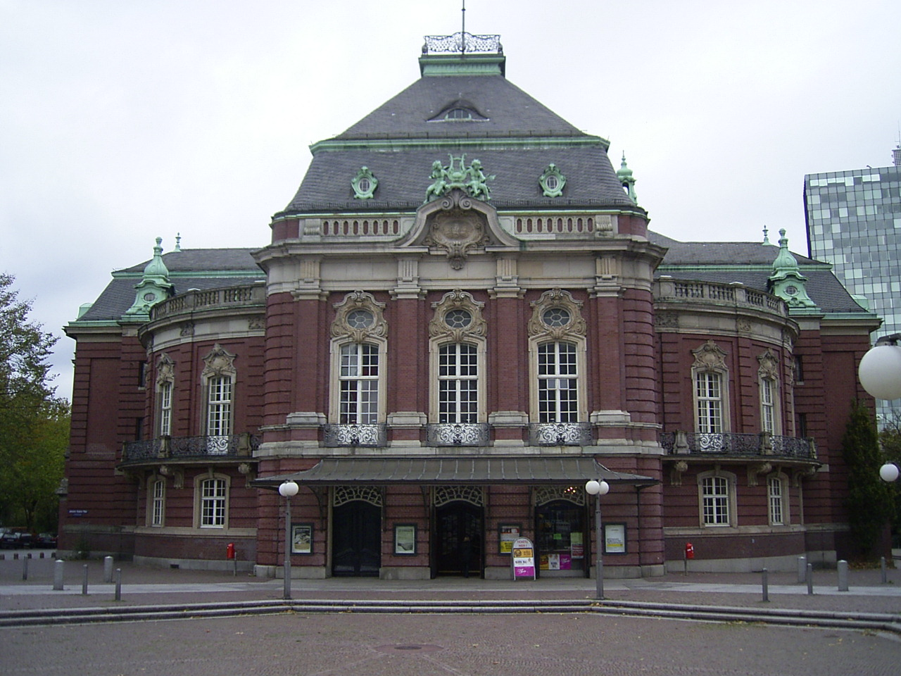 Die Laeiszhalle am Johannes-Brahms-Platz 20 in der Hamburger Neustadt wurde von 1904 bis 1908 als Konzerthaus nach Plänen von Martin Haller und Wilhelm Emil Meerwein erbaut. Finanziert wurde die Halle aus einem Vermächtnis des 1901 verstorbenen Reeders Carl Heinrich Laeisz und einer Spende seiner Witwe Sophie. This is a photograph of an architectural monument.